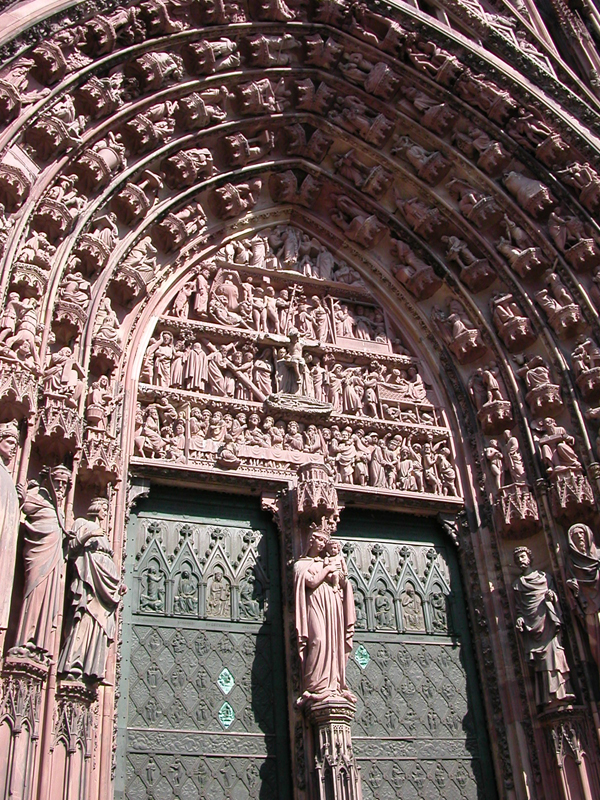 Détail du portail principal de la cathédrale de Strasbourg Auteur : Quedza Date : 7 avril 2006